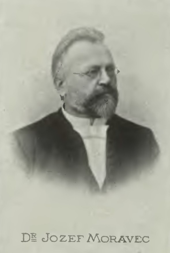 Portrét – Josef Moravec (1850-1937), Český lékař a politik.